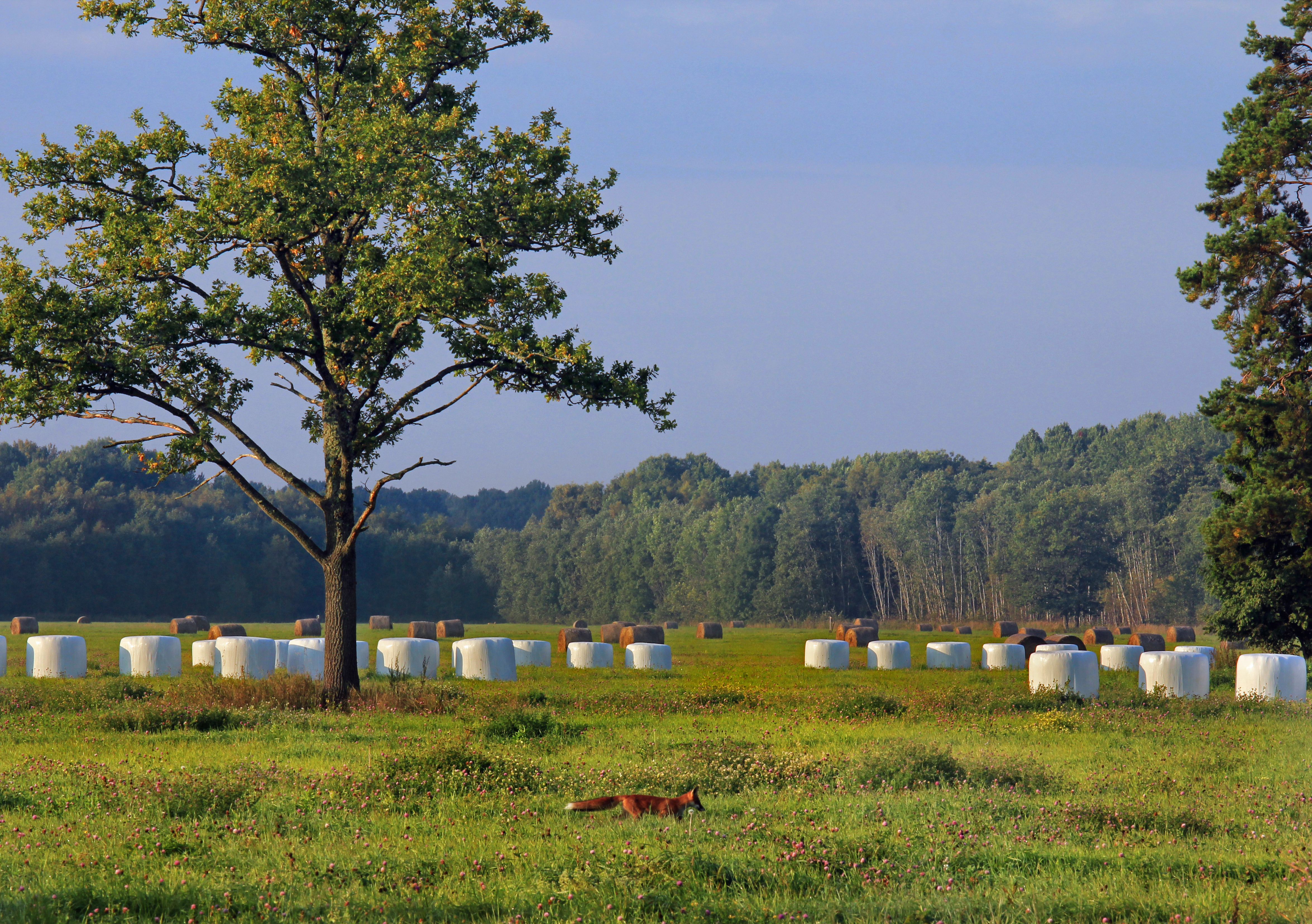 Hommikune jalutuskäik Sinalepa rohumaadel Ridala vallas, Läänemaa.